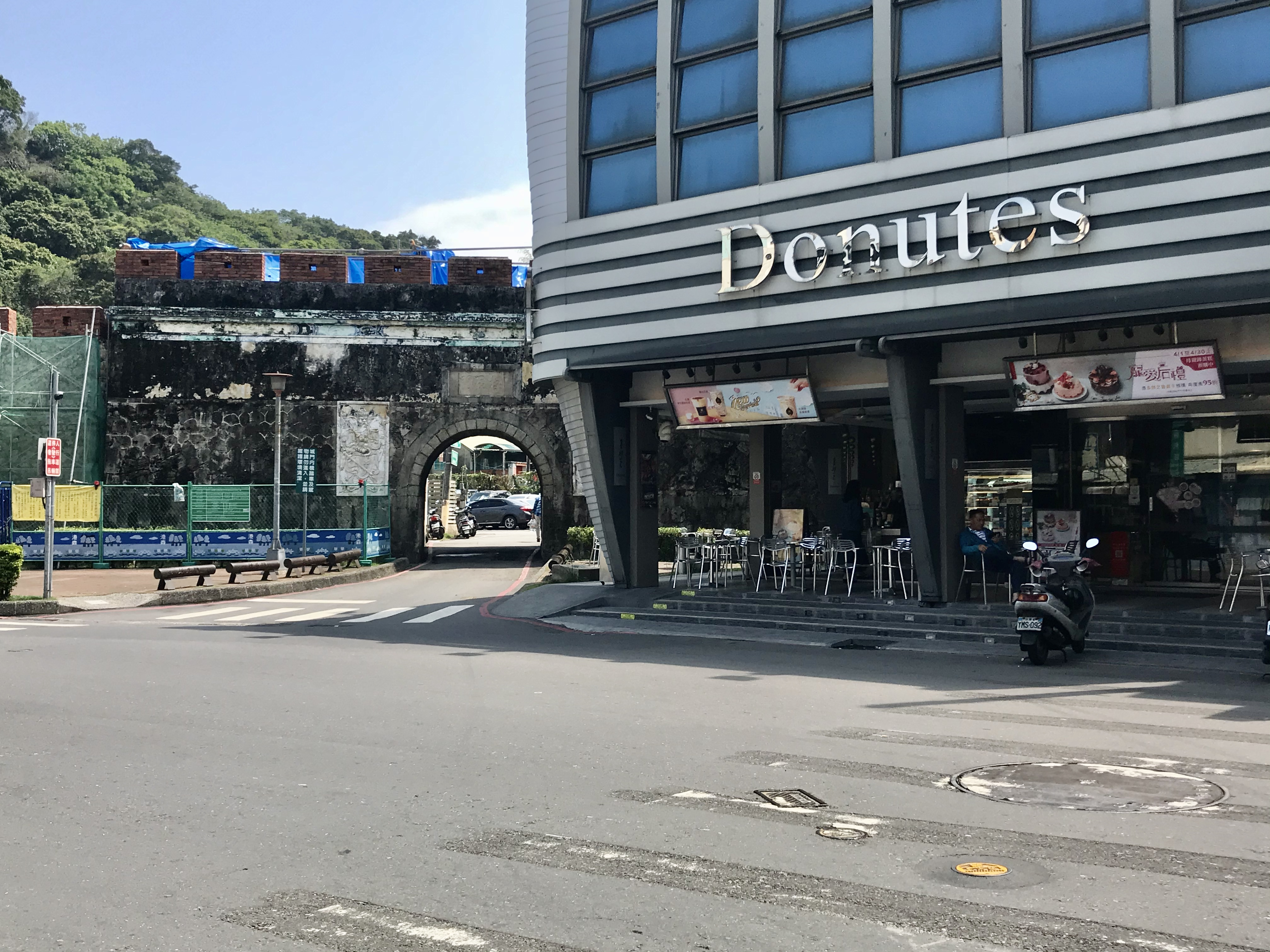 鳳山縣舊城北門與拱辰井